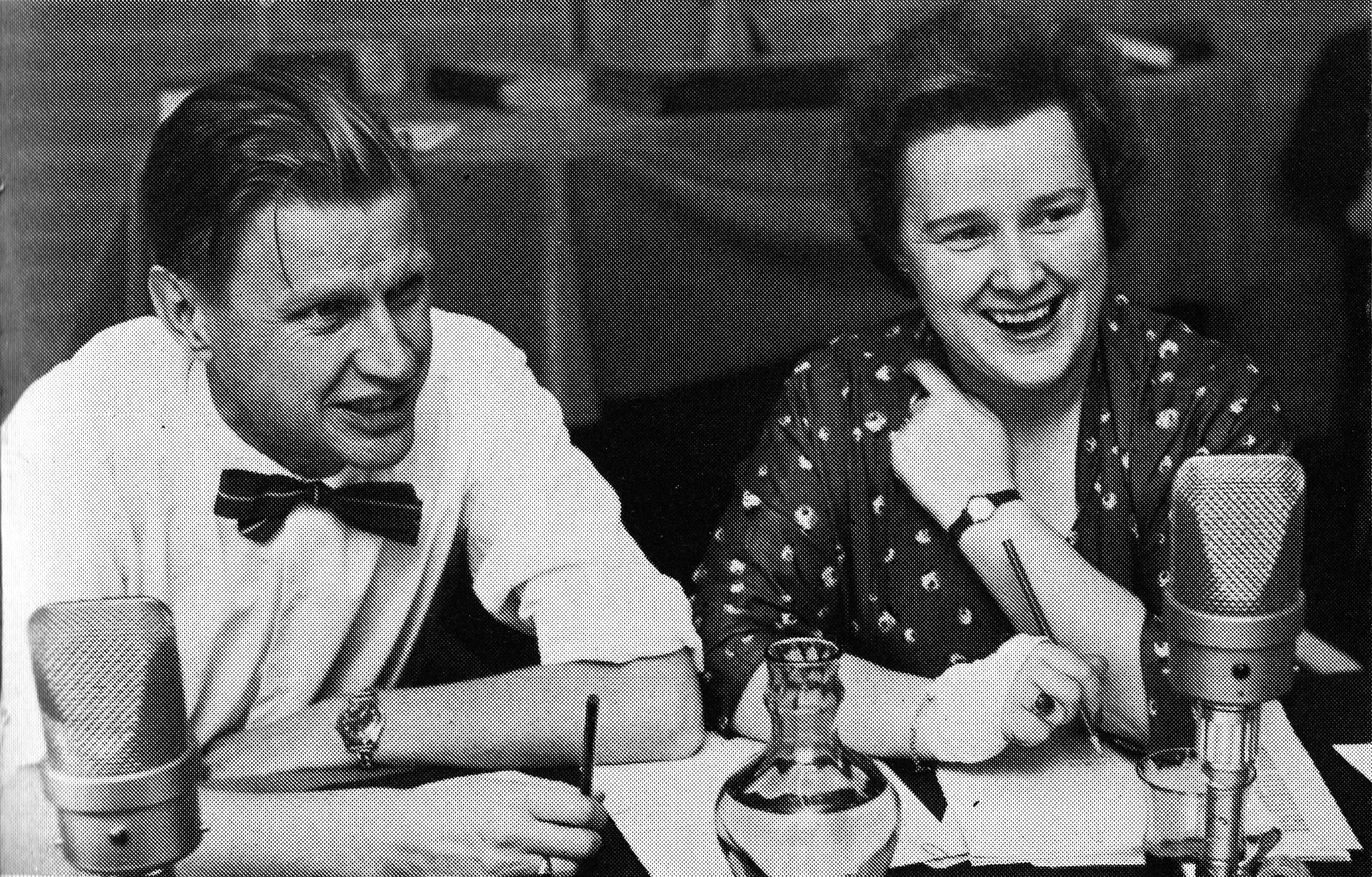 Skannad från boken Hört och sett: radio och television 1925-1974 (1974) s. 105. Information från svtbild.se: Utan bildtext. Not. Vi som vet mest den 29/10-58. Jurymedlemmarna: Rolf Lundgren och Marianne Orup Anm. Publ. i boken Hört och sett, s.105: "De glada nunorna på bilden tillhör Rolf Lundgren och Marianne Oruo. Den förre har varit chef för barn- och undervisningsredaktionerna och är nu programdirektör för hela utbildningsenheten. Marianne Orup var verksam inom skolradion 1943-1956 med huvudsaklig uppgift att redigera skolradions programhäften. Sedan ett tiotal år tillbaka är hon chef för barnradion."